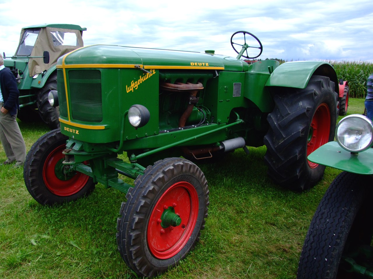 Deutz F4L514/4-NKF luftgekühlt, Baujahr 1962